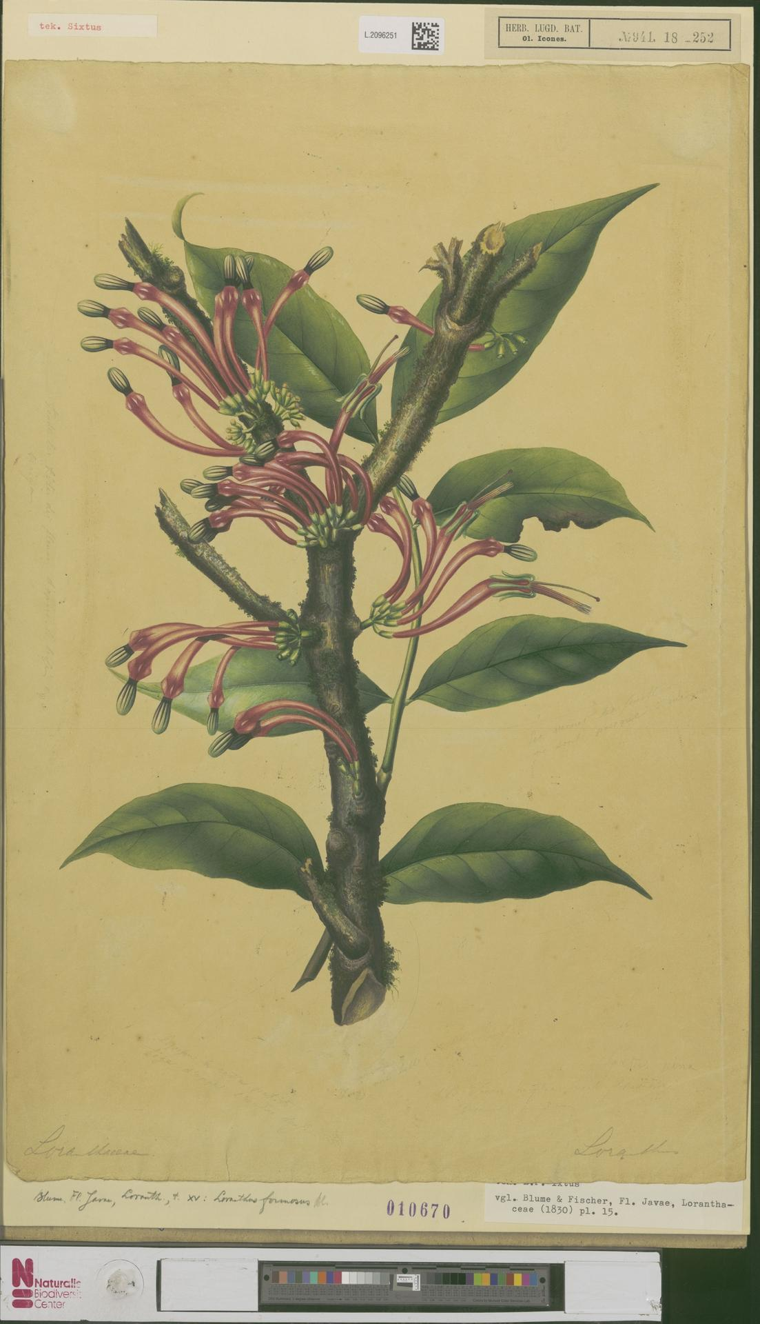 Macrosolen formosus (Blume) Miquel